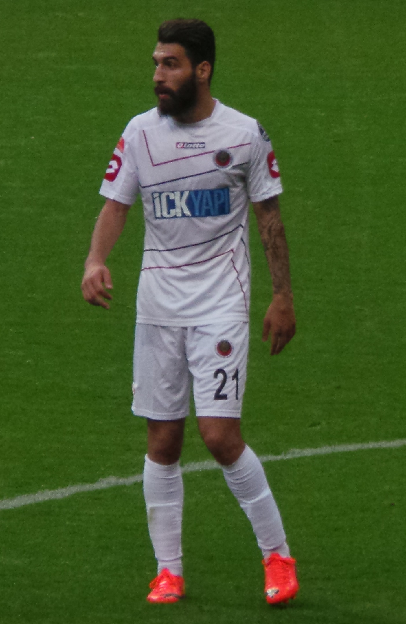 Jimmy Durmaz